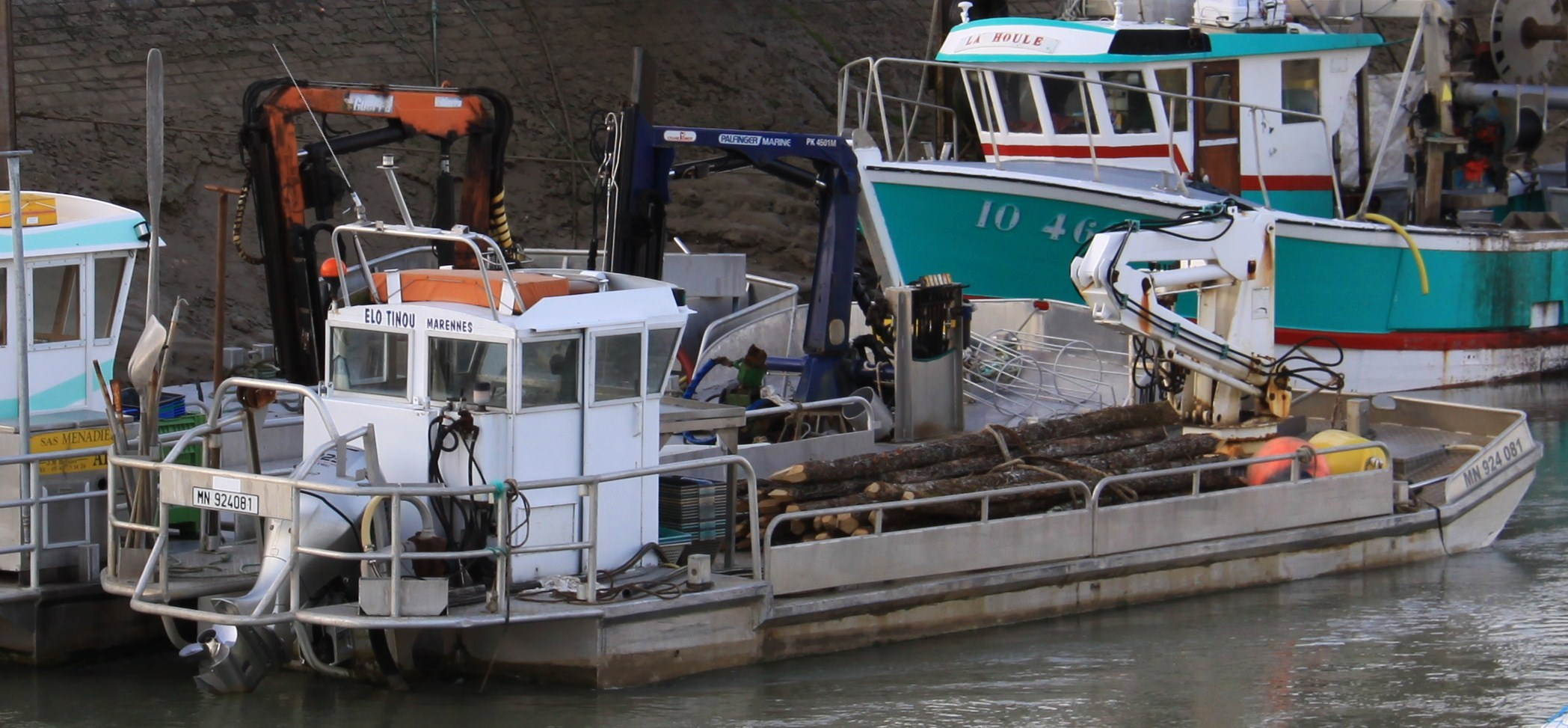 Un chaland ostréicole à marée basse dans le chenal de La Perrotine à Boyardville. Cette barge est utilisée pour des activités mytilicoles, en effet, elle est chargée de pieux en bois qui seront plantés dans les bouchots (parcs à moules). Ce chaland est en aluminium. Il est appelé "Elo Tinou". Immatriculation: MN 924081. Photographie recadrée. Boyardville (Commune de Saint-Pierre d' Oléron), Île d' Oléron, Charente Maritime, France.